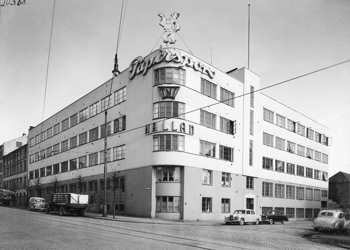 Hallans fabrikk i Malmøgata 13 (tidl. 7), 1955. Arkitekt: Ragnvald Tønsager (1939). Vernet etter PBL.